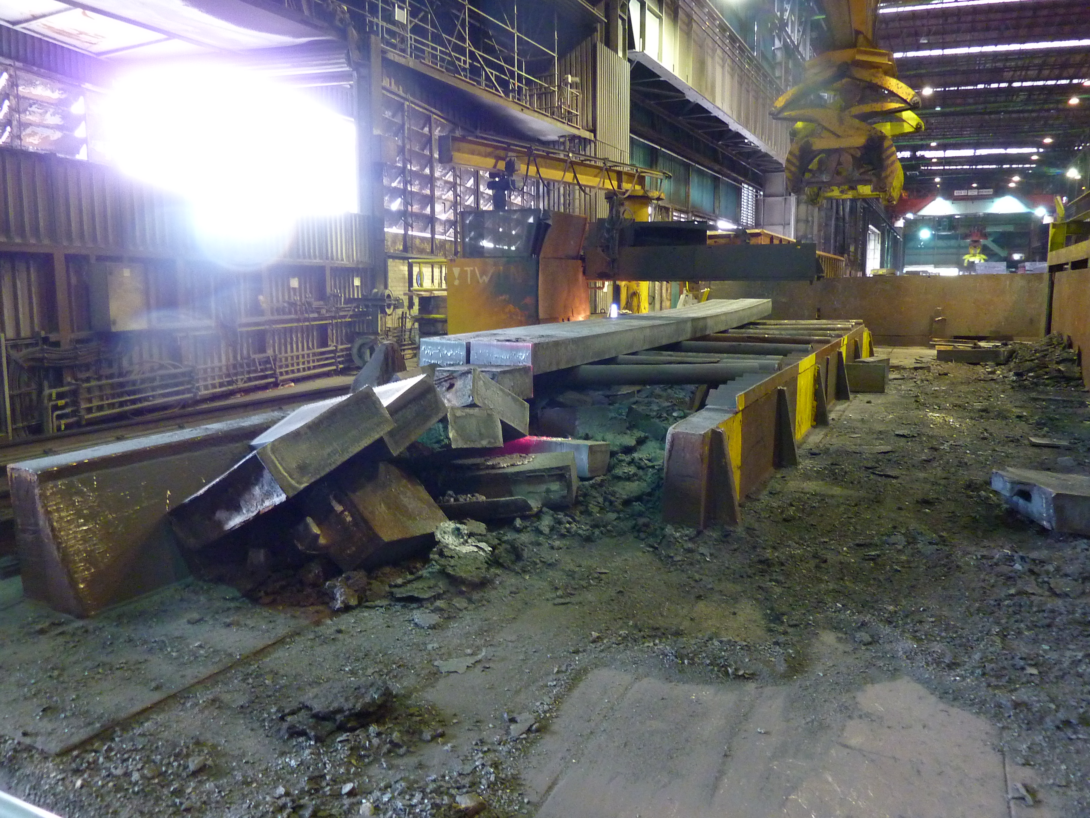 Brammenabbrennmaschine. Im Hintergrund ist der Hallenkran mit angehängter Brammenzange zu sehen. Im Vordergrund liegen Verschnittstücke, teilweise noch glühend. Die blaue Flamme die zum Abbrennen verwendet wird, ist nach dem Schnitt gedrosselt zu sehen. Dieses Bild entstand am Tag der offenen Tür der HKM in Duisburg.